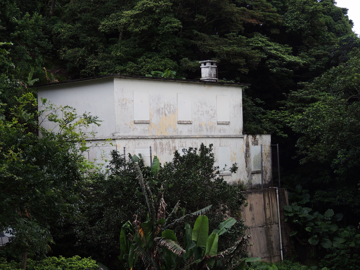 Peak Depot, Hong Kong